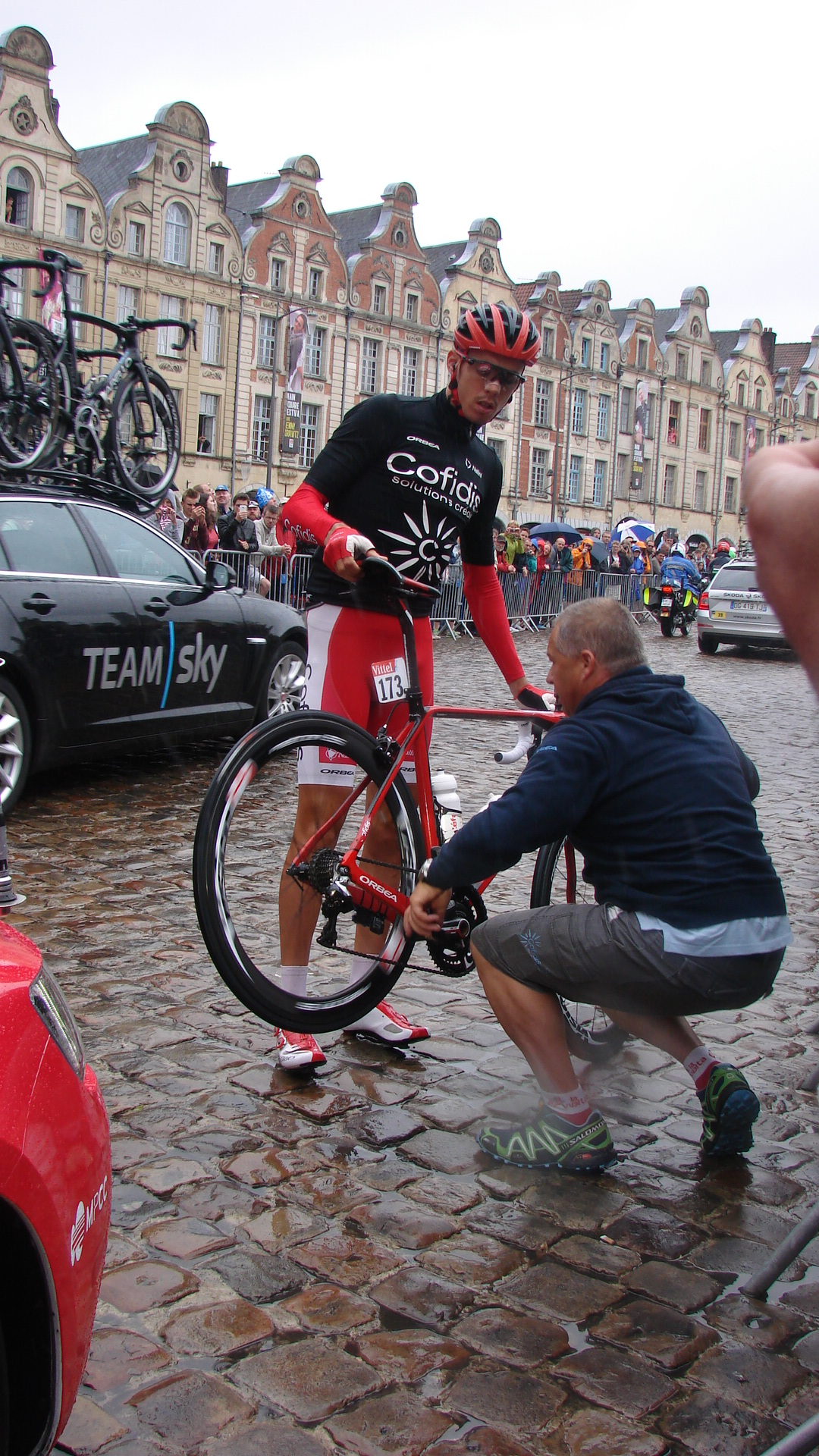 Christophe Laporte se faisant changer une roue sur la Place des Héros à Arras